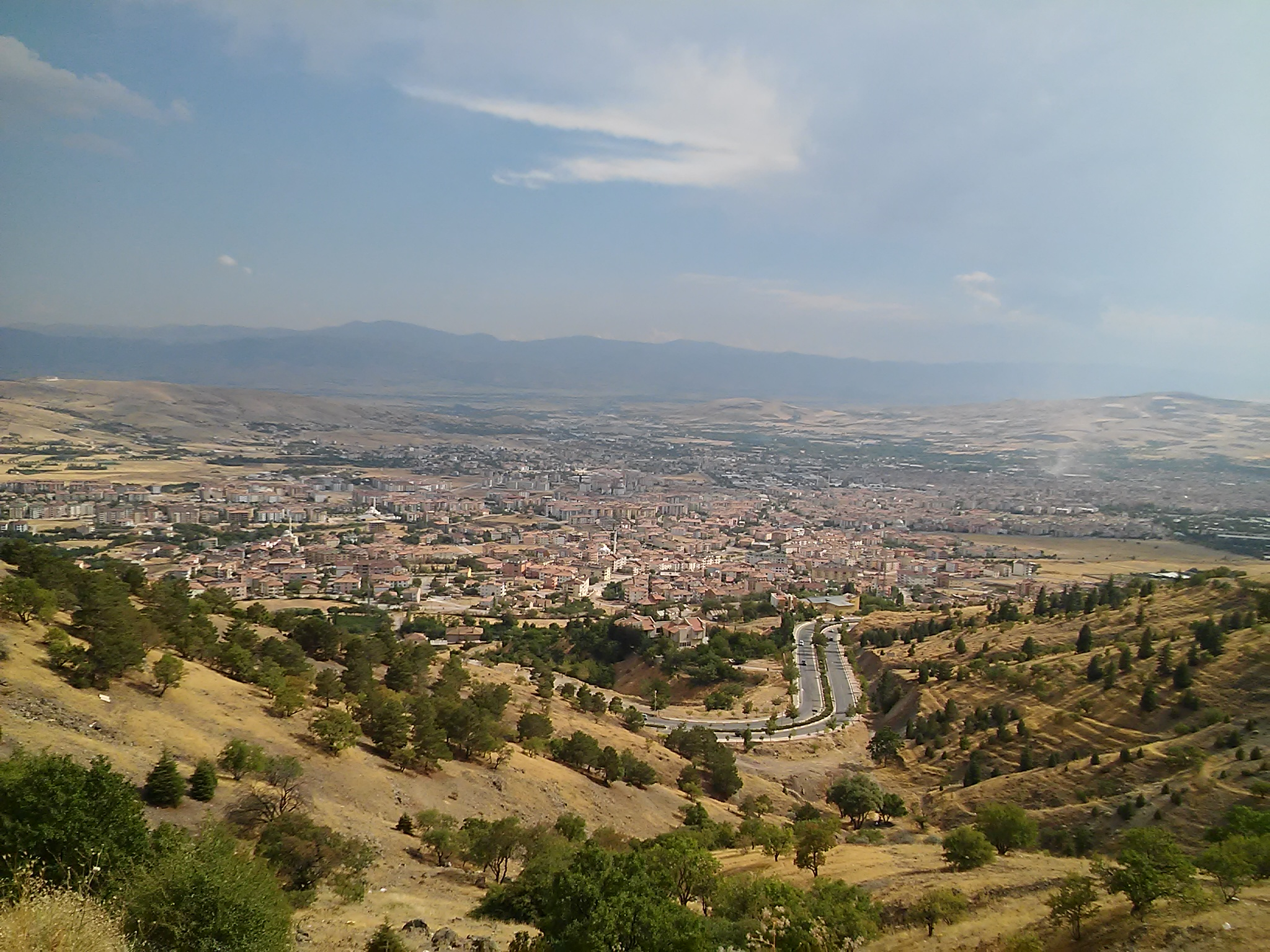 elazığ, turkey from harput